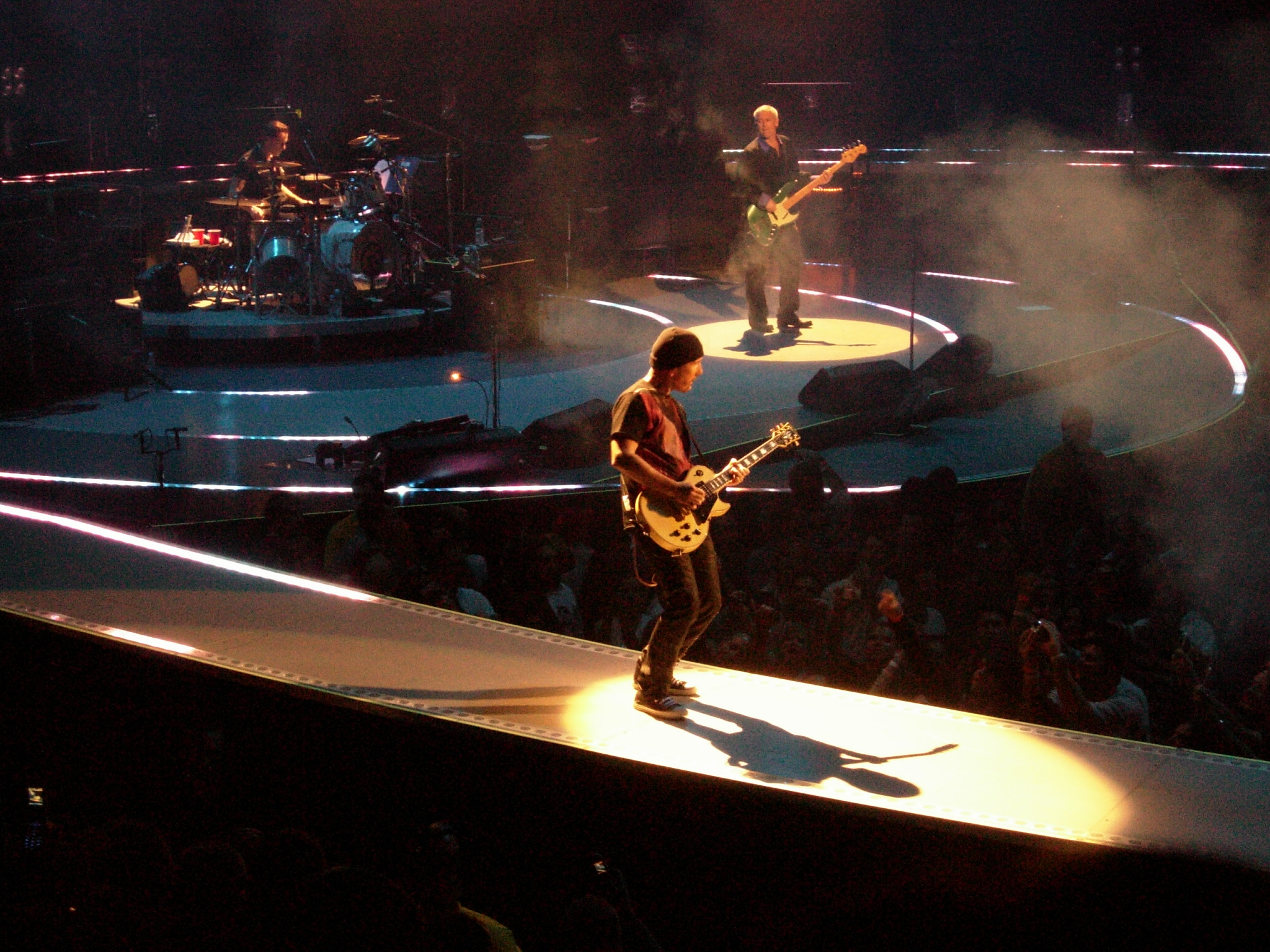 U2 on 1. April 2005 in Anaheim.